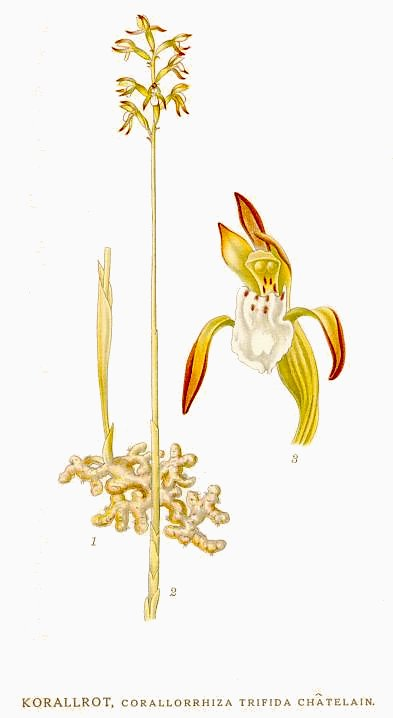 Original Description Korallrot, Corallorrhiza trifida Châtel.